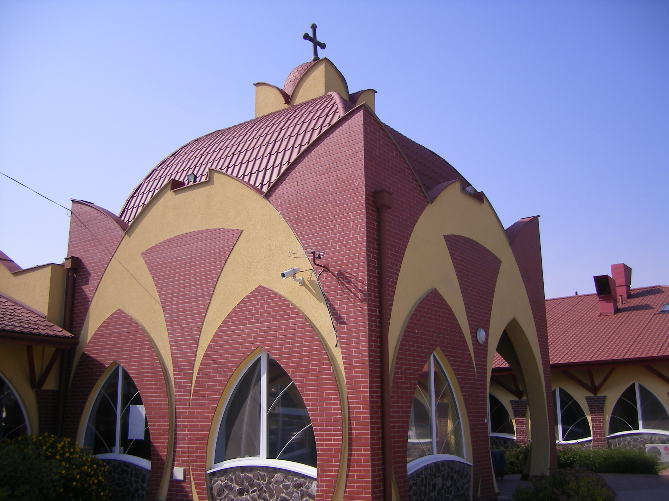 Budova termálních lázní ve Veľkém Mederu, okres Dunajská Streda, Slovensko